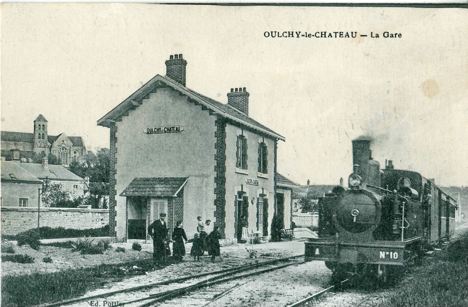 Carte postale ancienne éditée par Pottier : OULCHY-LE-CHATEAU - La Gare. Chemins de fer départementaux de l'Aisne